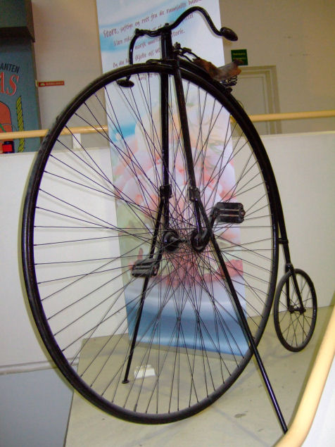 Boneshaker, Velosiped